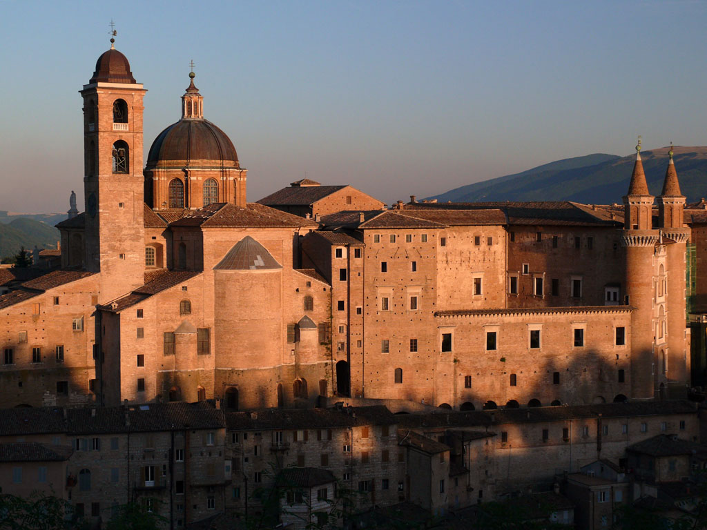 Urbino: Palazzo Ducale & Duomo